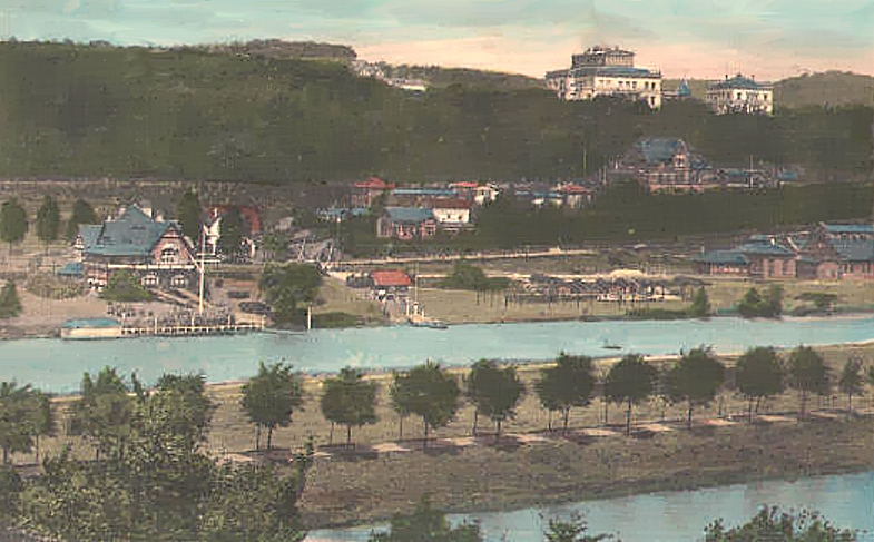 Villa Hügel und die Ruhr vor der Existenz des Baldeneysees